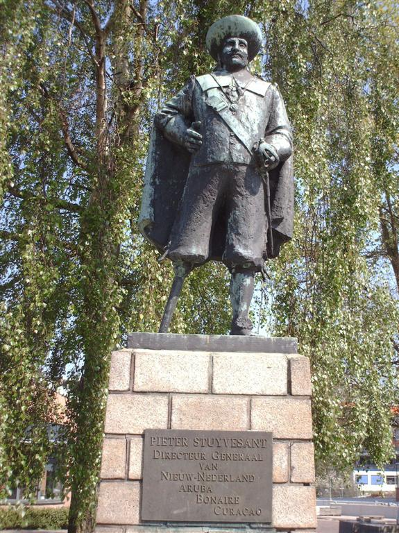 Standbeeld Pieter Stuyvesant in Wolvega